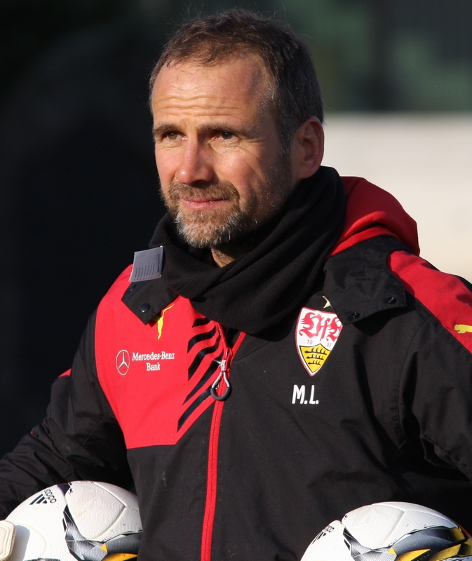 Marco Langner, Torwarttrainer des VfB. Bild von